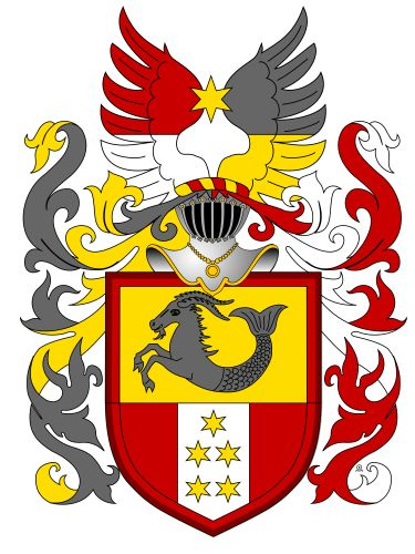 Rodový znak Mikuláše Šuda ze Semanína